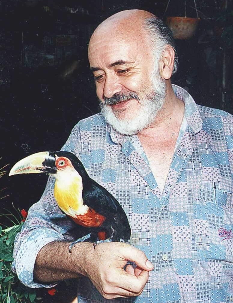 Esteban Abad (Santa Fe, 30 de junio de 1942) es un escritor y periodista argentino y uno de los referentes más conocidos en la actualidad de la literatura misionera. Desde 1977 vive en Posadas (capital de la provincia de Misiones).